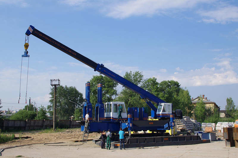 Сваевдавливающая установка работает в Вологде